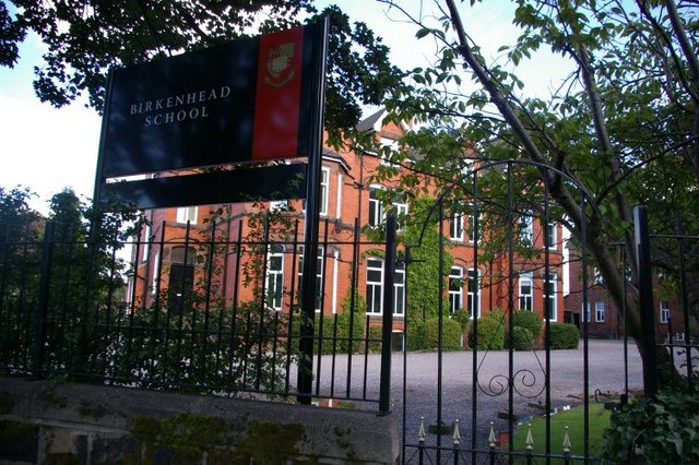 Birkenhead School